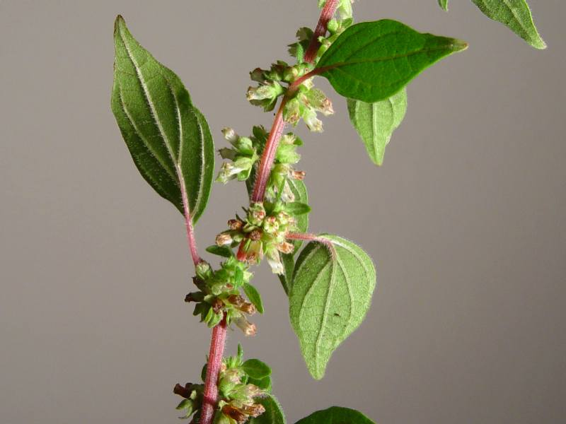 Parietaria judaica, Family Urticaceae in San Francisco, California